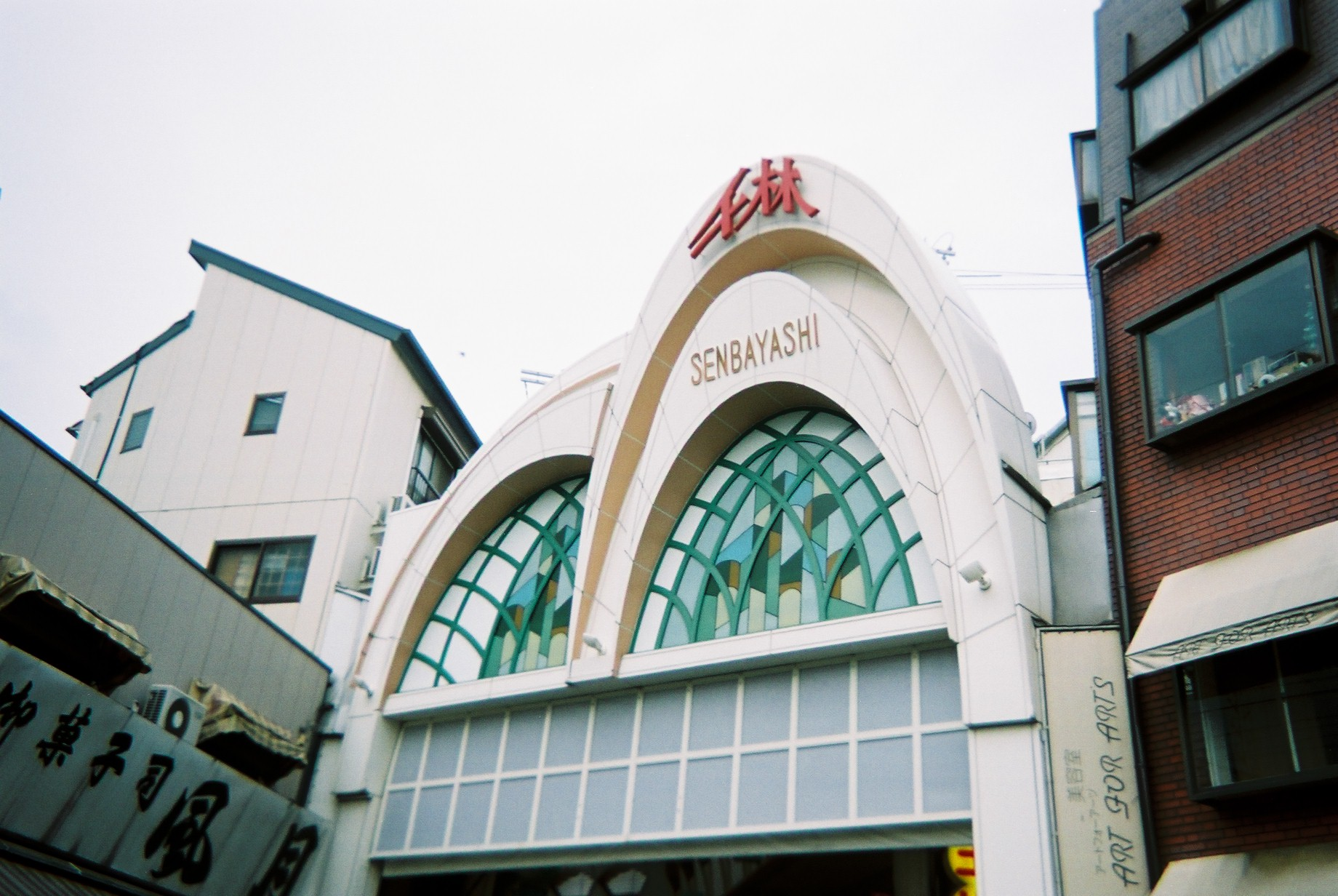 千林駅側入口